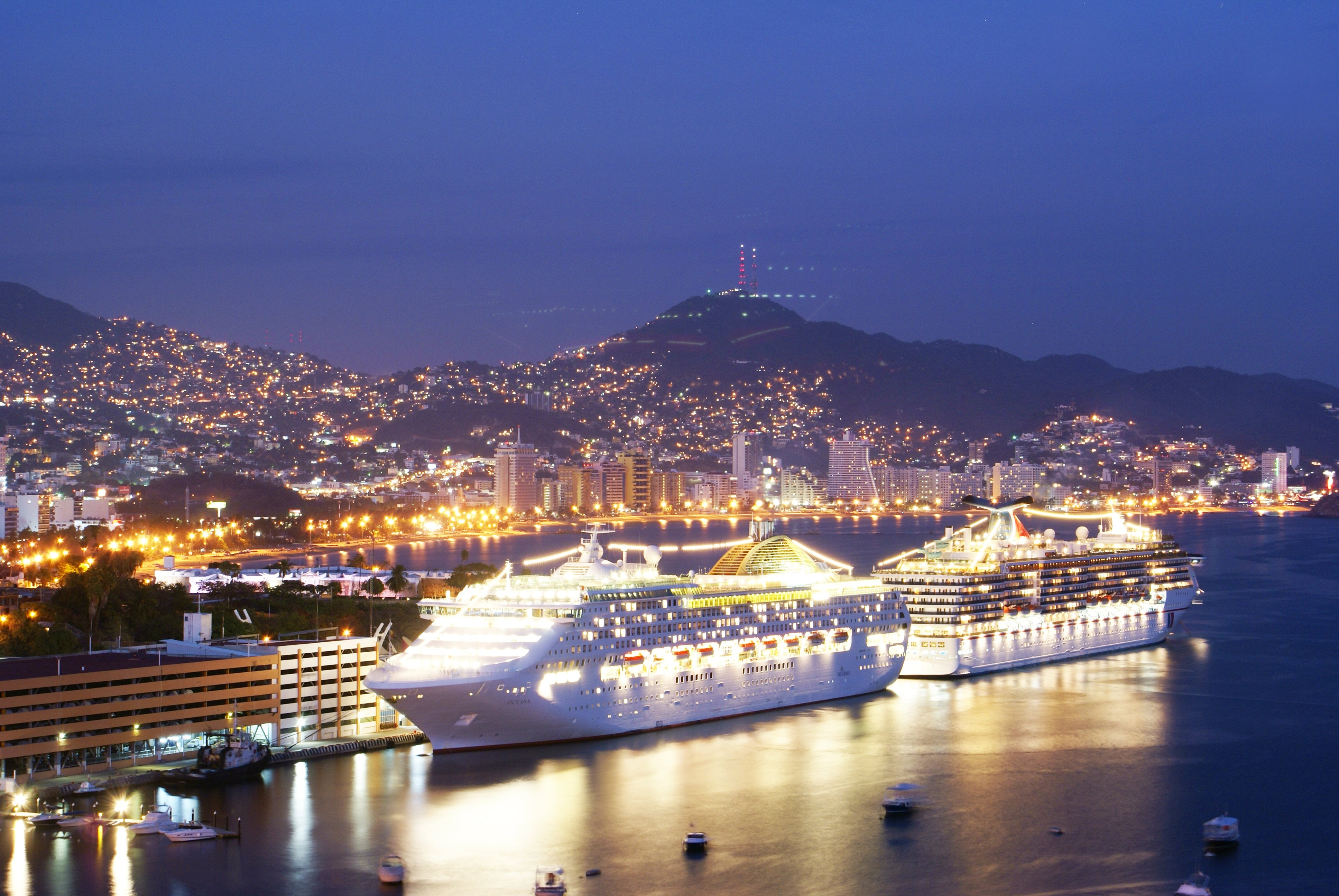 Puerto Marítimo, Acapulco, Guerrero